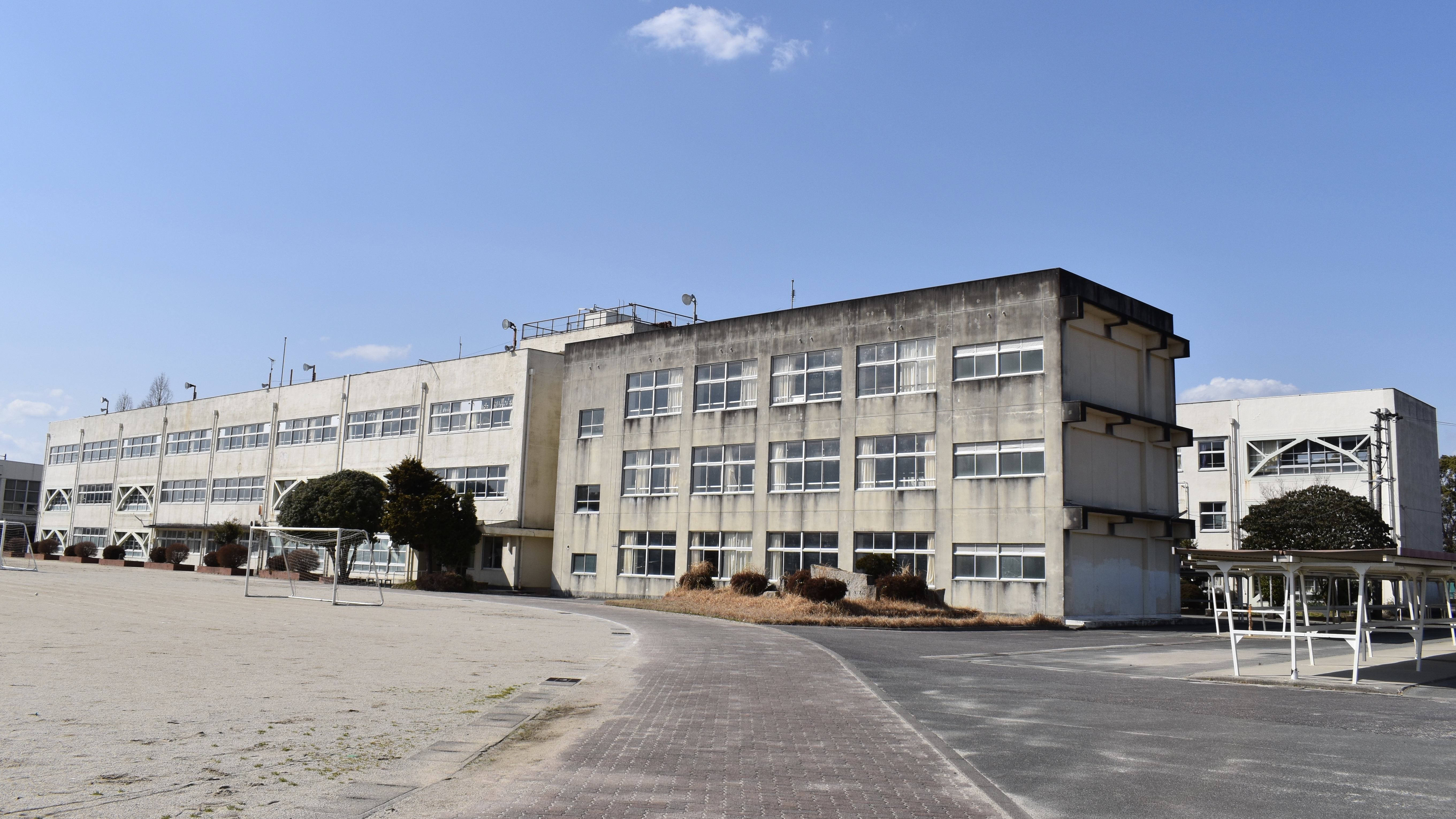 明和中学校旧校舎